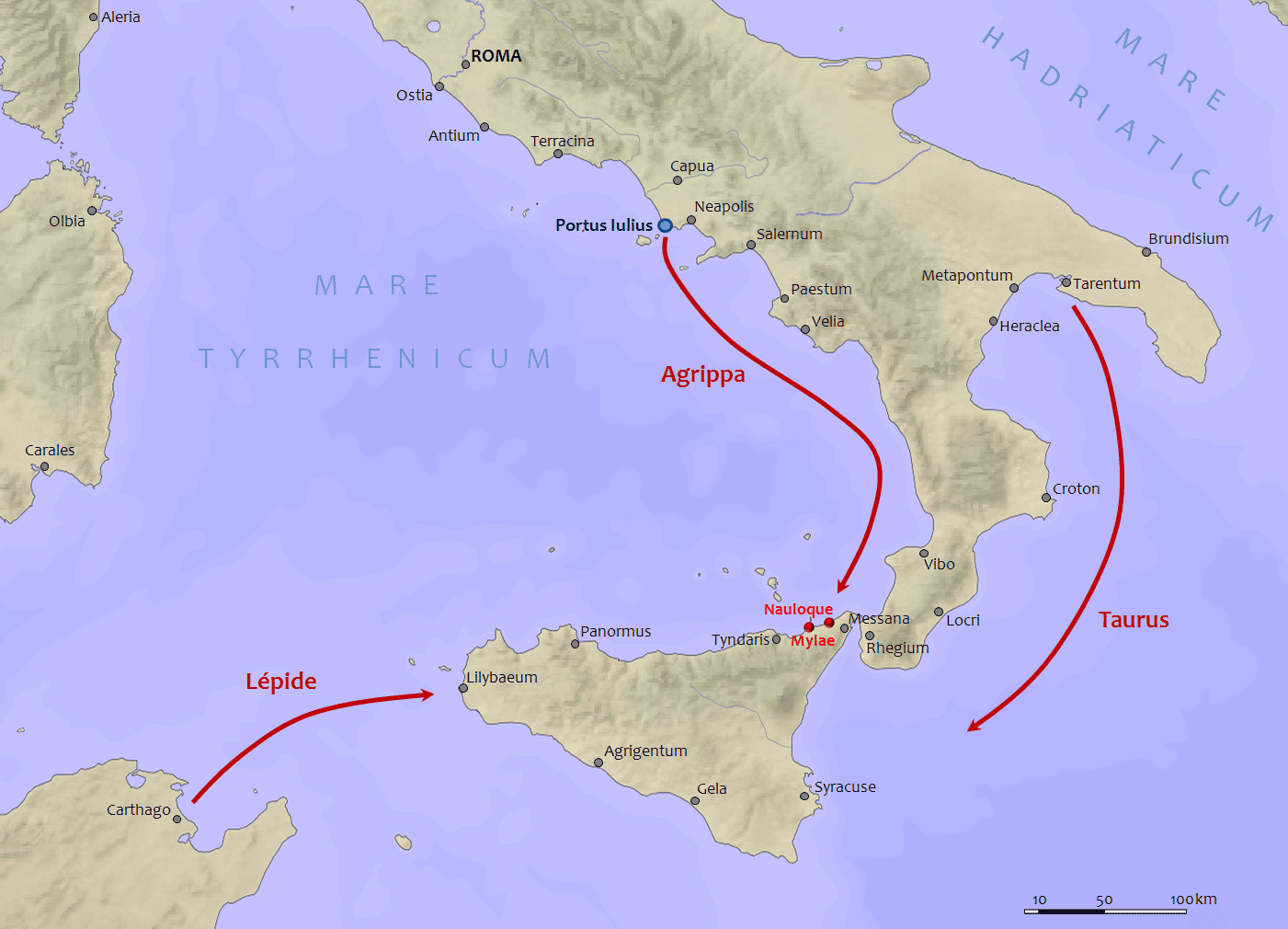 Plan d'offensive de la Sicile d'Auguste et Agrippa contre Sextus Pompée en 36 av. J.-C.